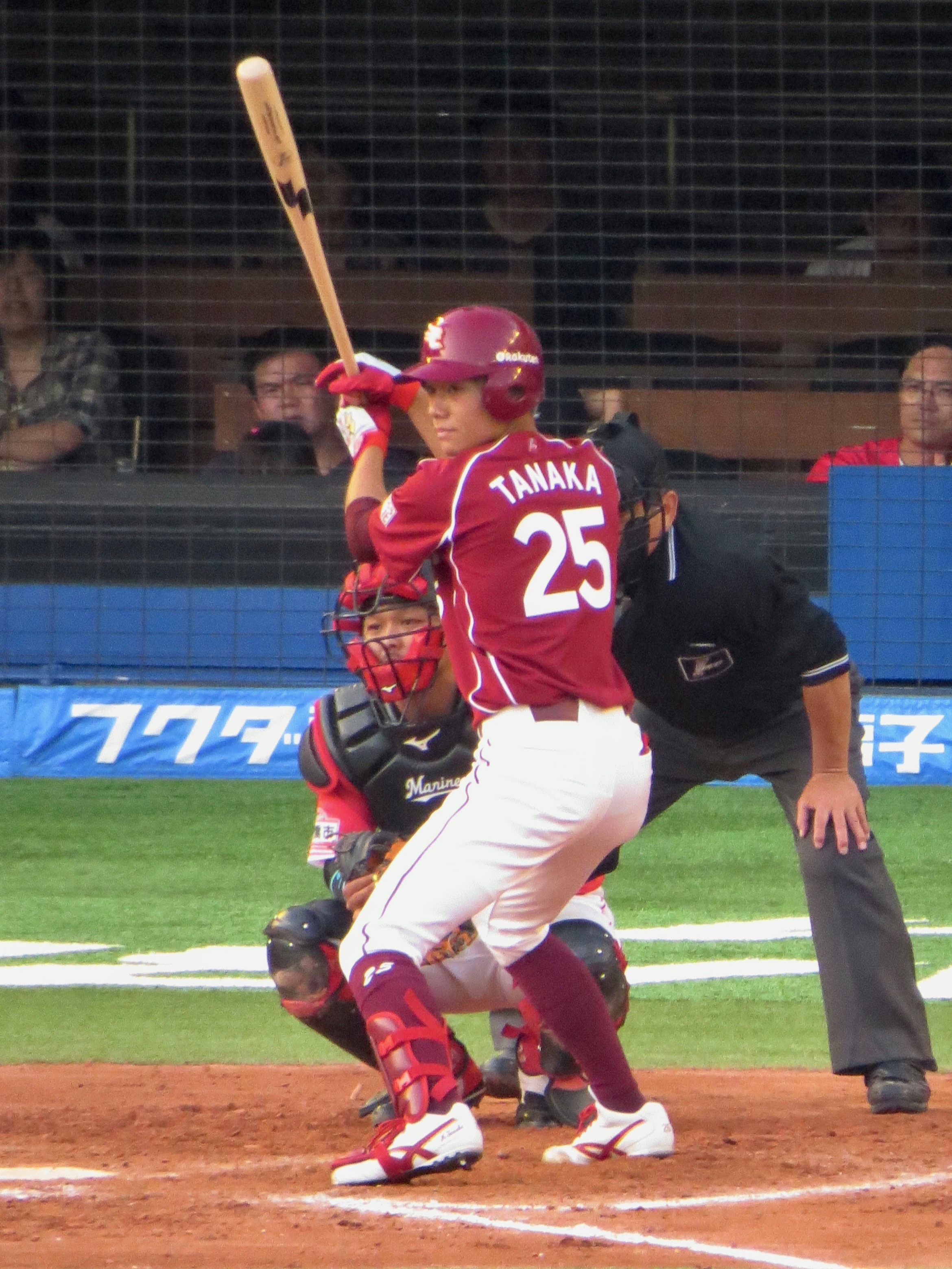 東北楽天ゴールデンイーグルス外野手の田中和基。ZOZOマリンスタジアムにて。